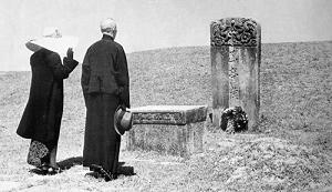 1949年春，蒋介石夫妇在浙江奉化最后一次祭祖。